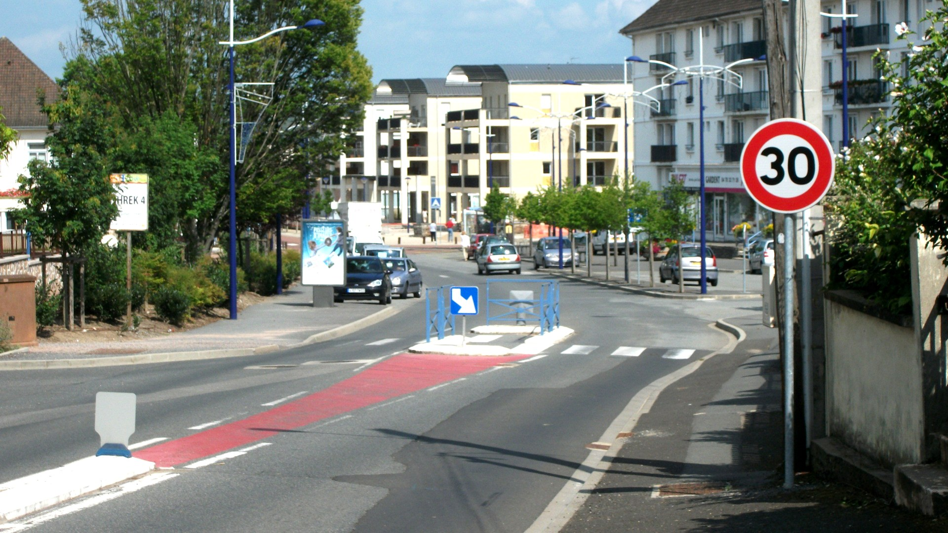 À partir du panneau la vitesse est limitée à 30 kilomètres par heure.Panneaux : B14 Limitation de vitesse : Signaux Girod, 2011 (circonstance : arrêté municipal de la mairie de Bellerive-sur-Allier daté de 2011)